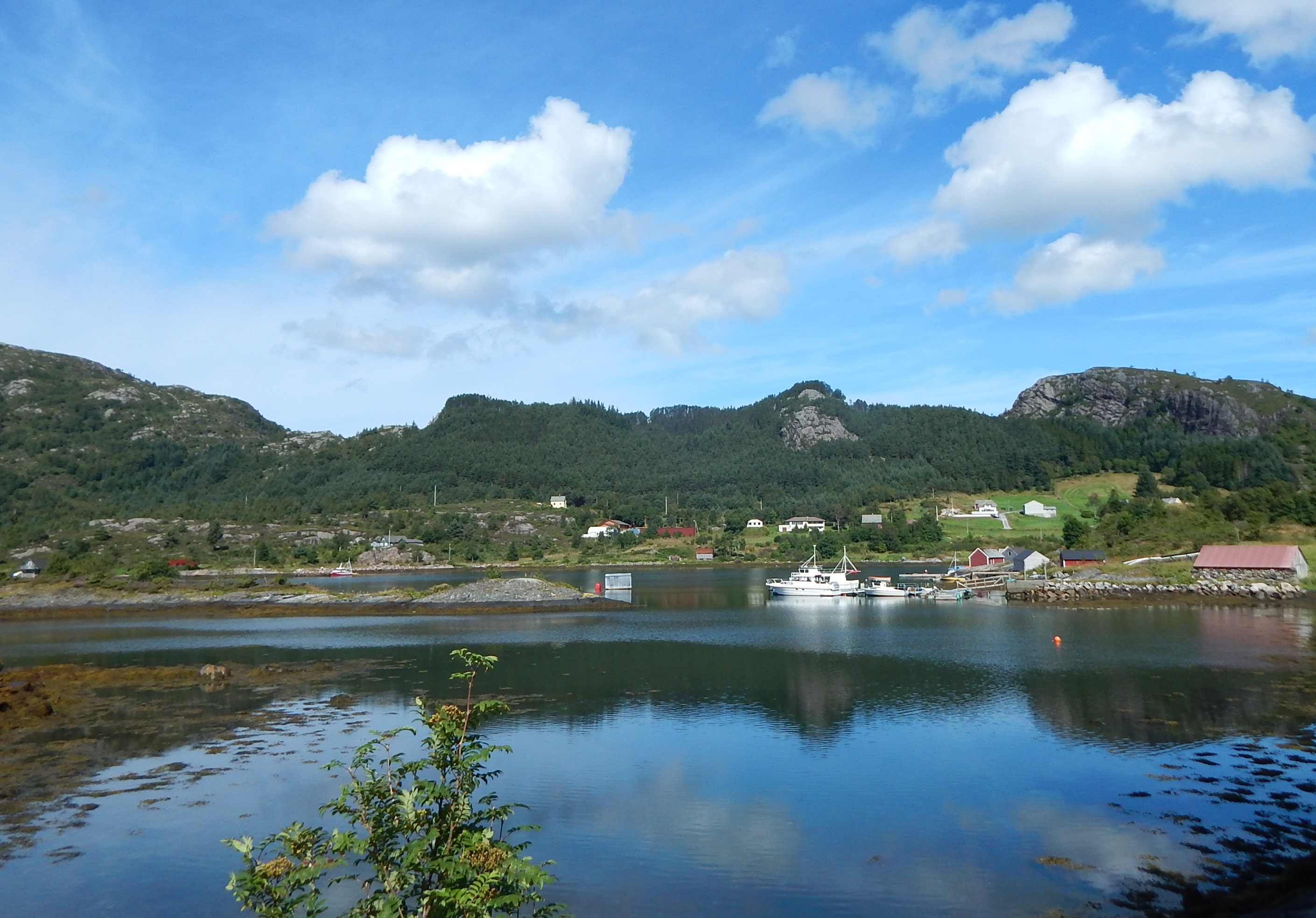 Vågsvågen ved Folkestad i Fjaler